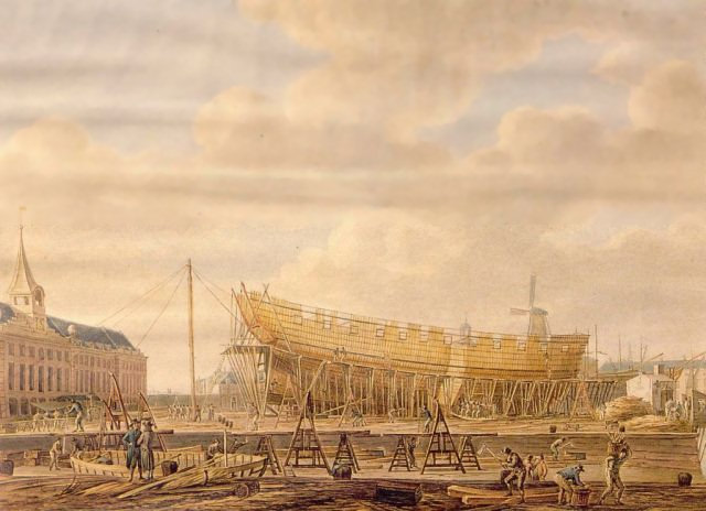 Admiraliteit in Rotterdam